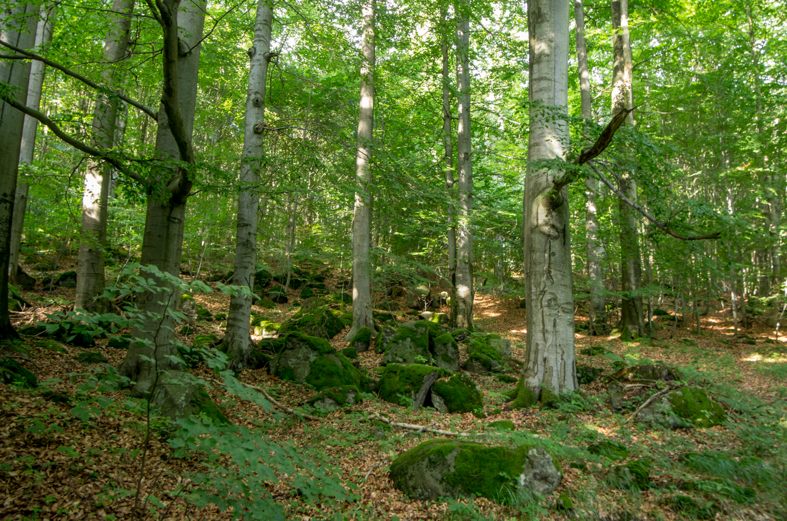 Přírodní rezervace Holina, porosty buků v rezervaci, Slavkovský les, okres Cheb